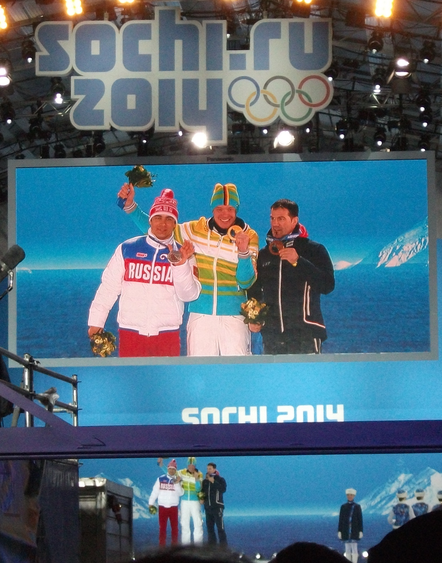 На церемонии награждения победителей санного спорта среди мужчин одиночников на XXII Зимних Олимпийских играх в Сочи. Медал Плаза в Олимпийским парке Сочи.